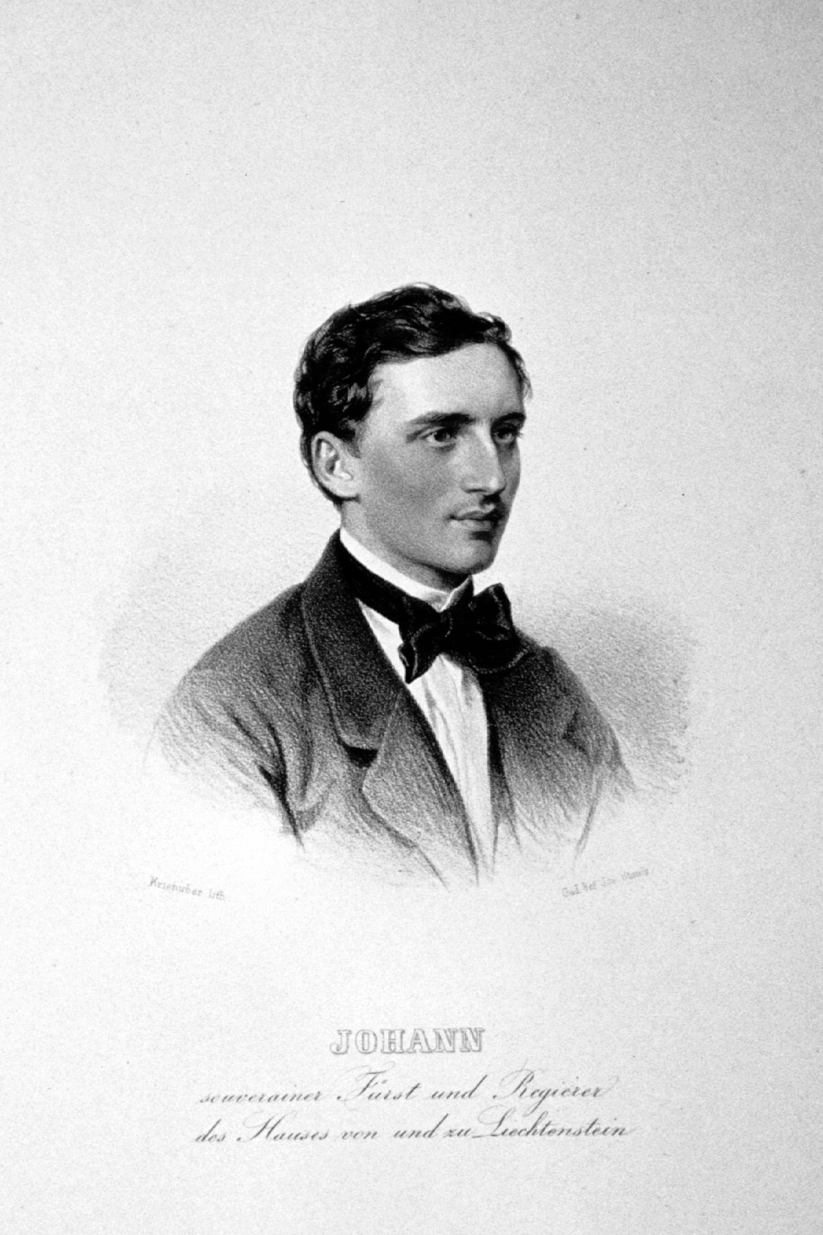 Johann II. Fürst von Liechtenstein (1840-1929), regierender Fürst von Liechtenstein. Lithographie von Josef Kriehuber, um 1860